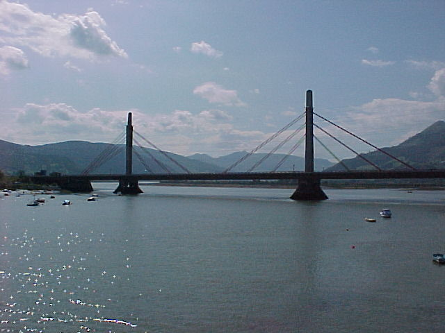 Puente nuevo de Colindres (Cantabria).